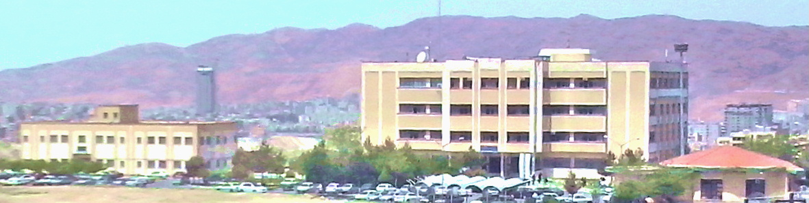 دانشگاه آزاد اسلامی واحد تبریز؛ دانشکده فنی و مهندسی (راست)، دانشکده علوم پایه (چپ)